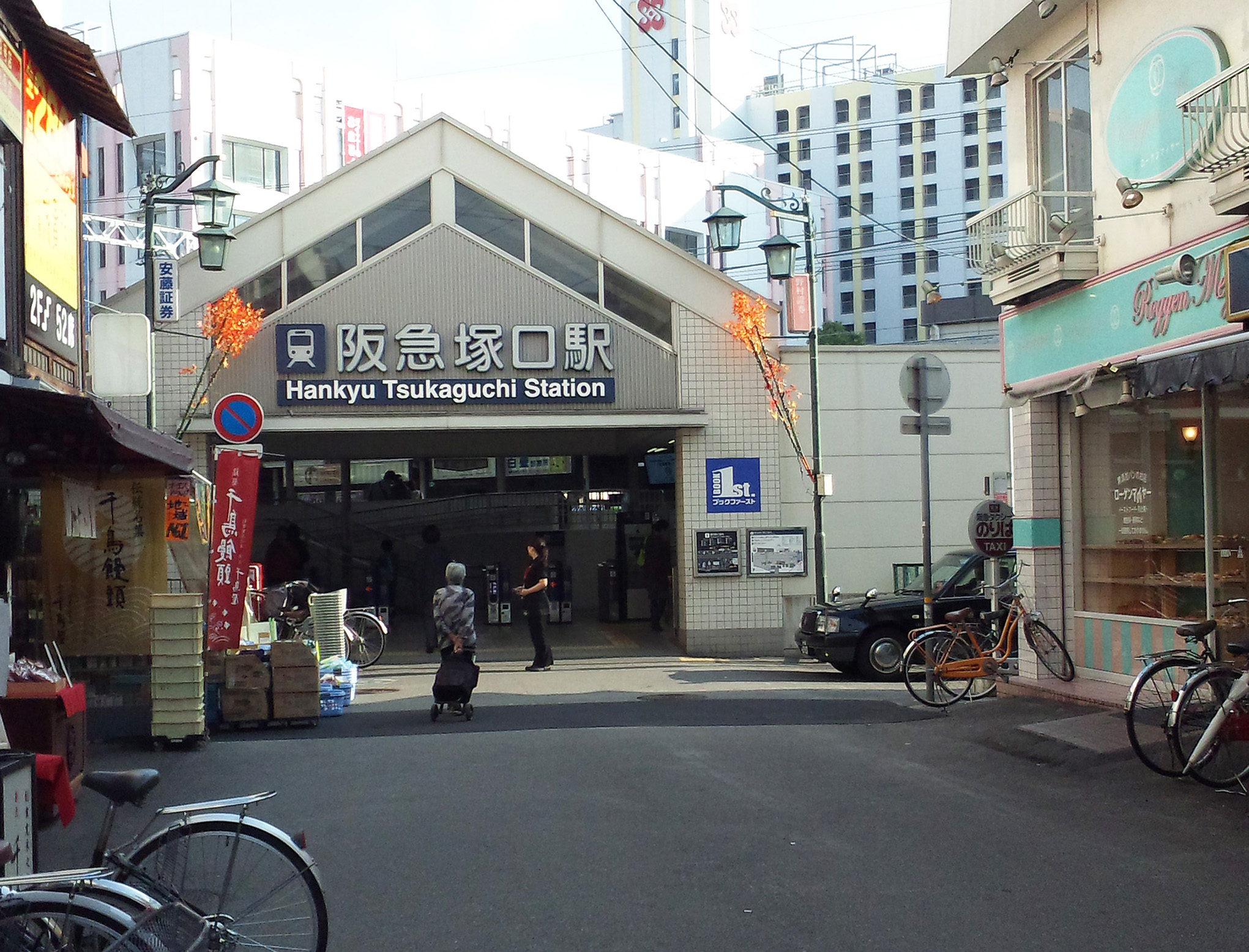 阪急塚口駅 北口